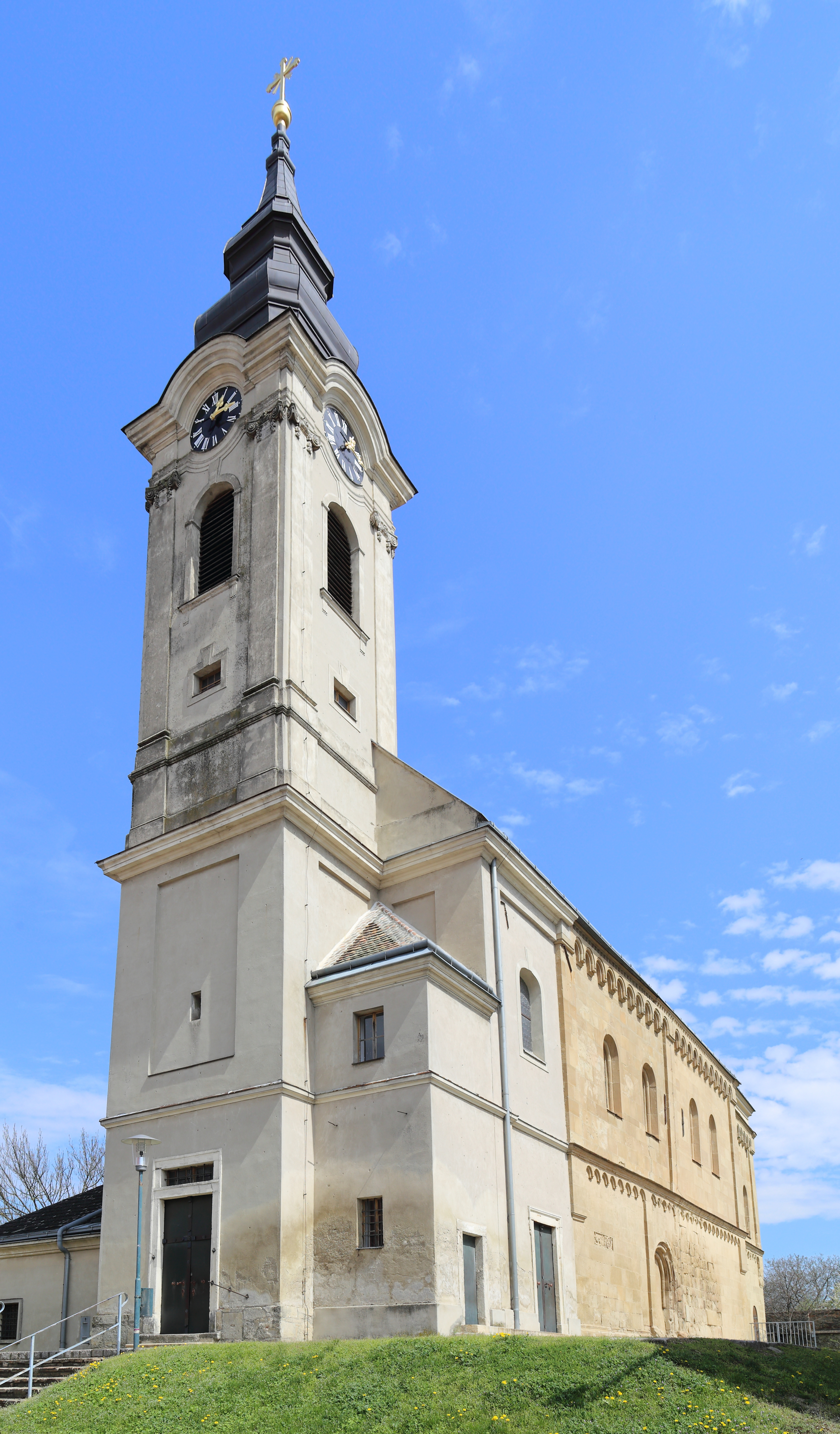 Südwestansicht der römisch-katholischen Pfarrkirche Mariae Geburt in Schöngrabern, ein Ortsteil der niederösterreichischen Marktgemeinde Grabern.Das Langhaus, das leicht eingezogene Chorquadrat und die Rundapsis sind spätromanisch (um 1210/30). Ende des 18. Jahrhunderts wurde der Turm über dem Chorquadrat abgetragen und Anfang des 19. Jahrhunderts das Langhaus um ein Joch verlängert sowie der Westturm errichtet. Nach einem Brand wurde der Turm 1866 erhöht.